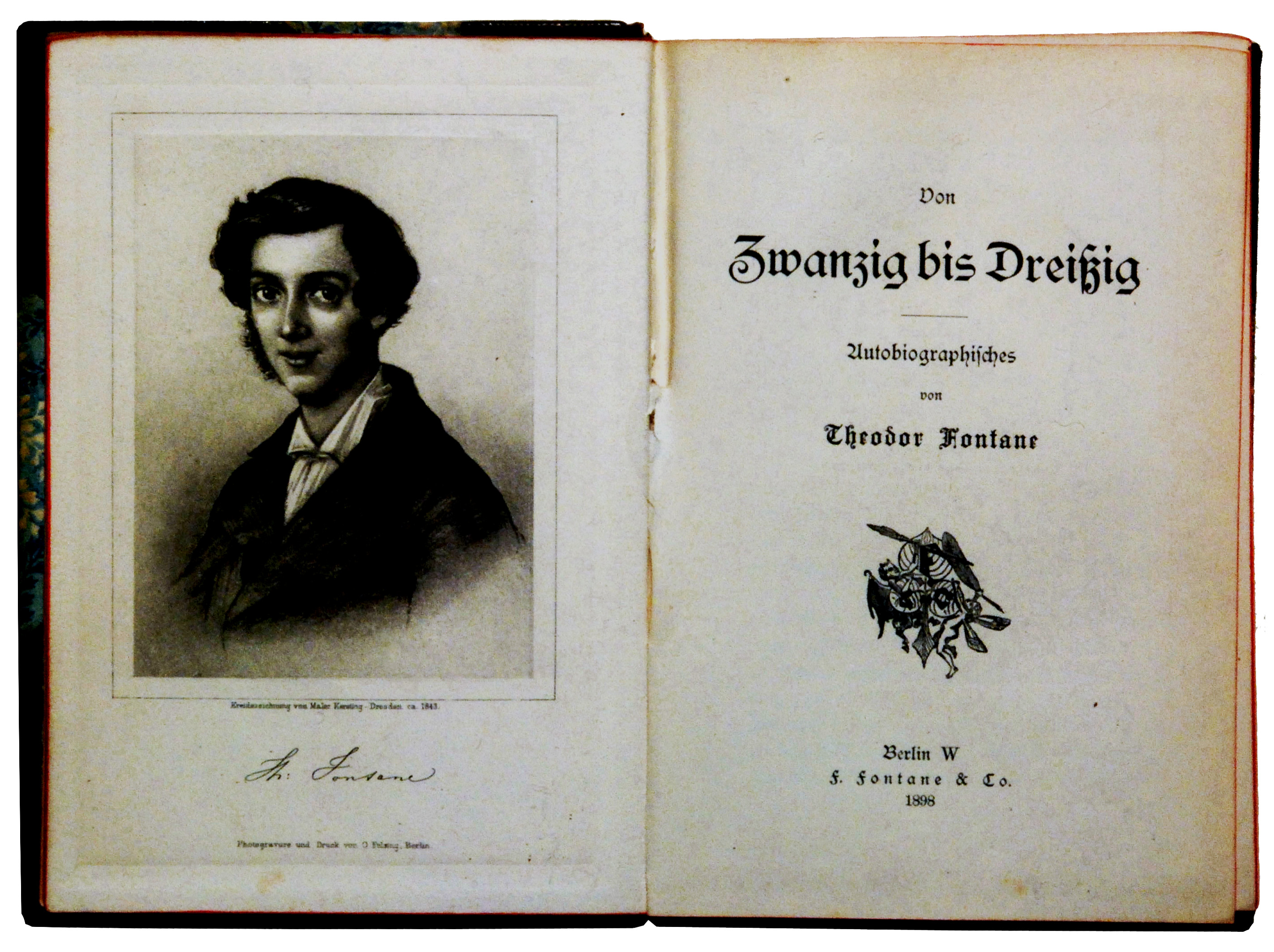 Fontane, Theodor: Von Zwanzig bis Dreißig. Autobiographisches. Berlin: F. Fontane & Co. 1898, 679 S.